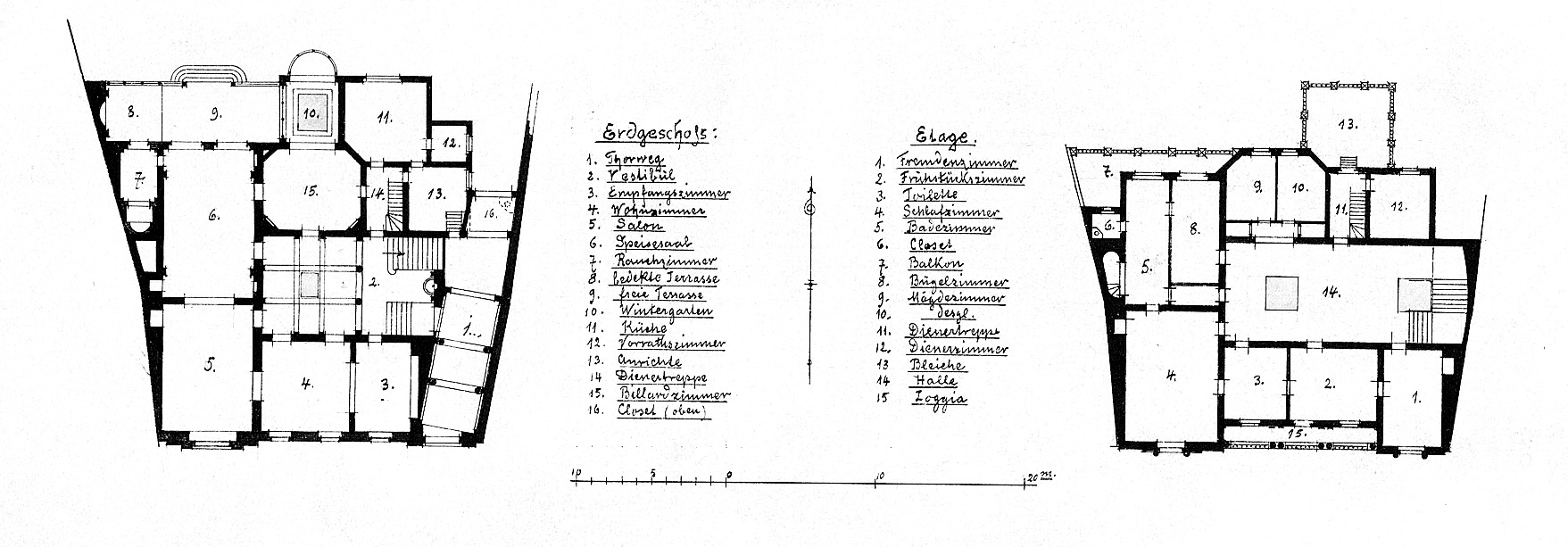 Haus Hofgartenstraße 6 Düsseldorf, Architekten "Boldt & Frings", erbaut in den 1880er Jahren, Grundriss